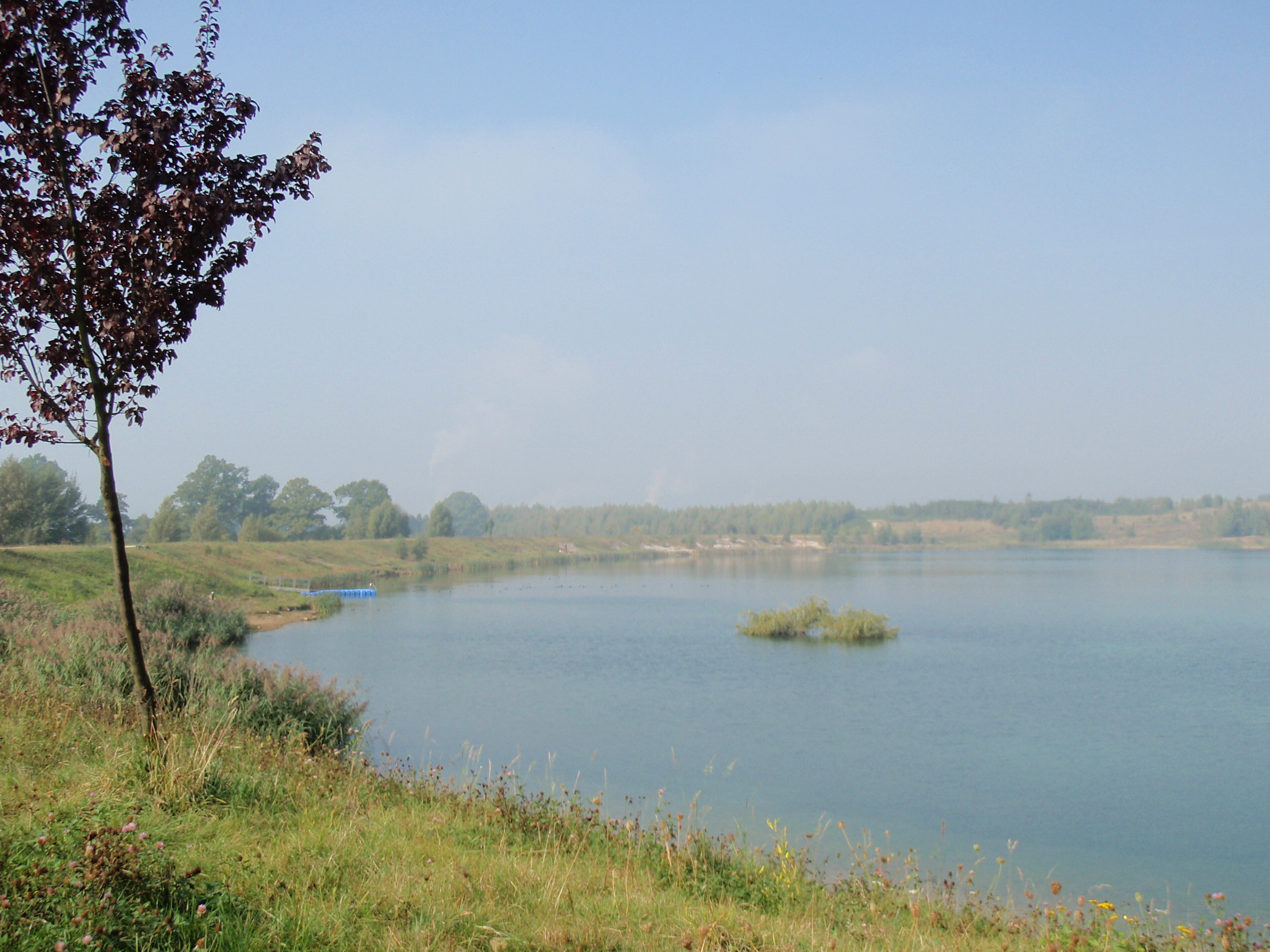 Bílá voda - koupaliště